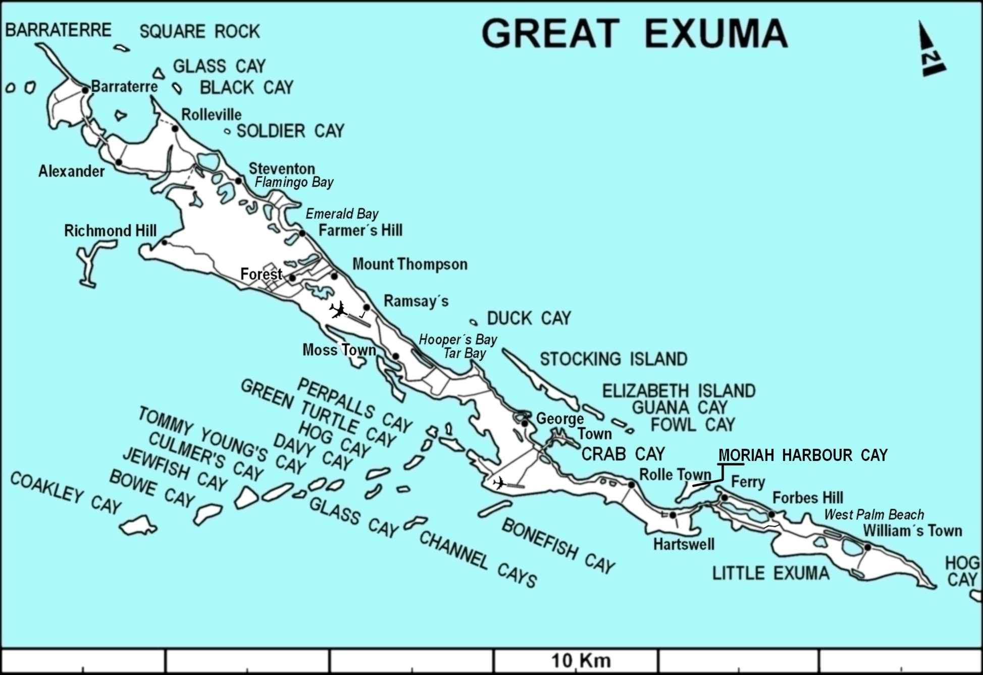 Übersichtskarte von Great Exuma, Klein Exuma